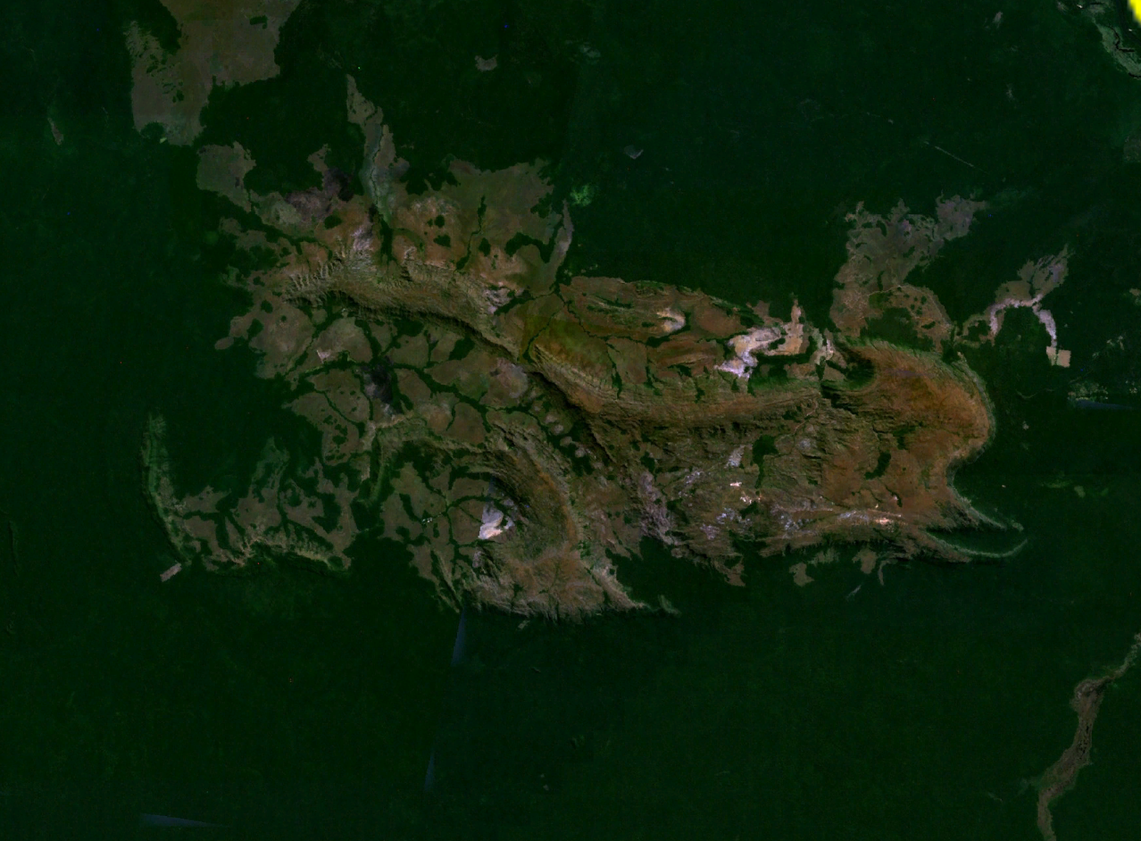 Imagen satelital de la Sirrania de San Simón ubicada entre Bolivia y Perú.